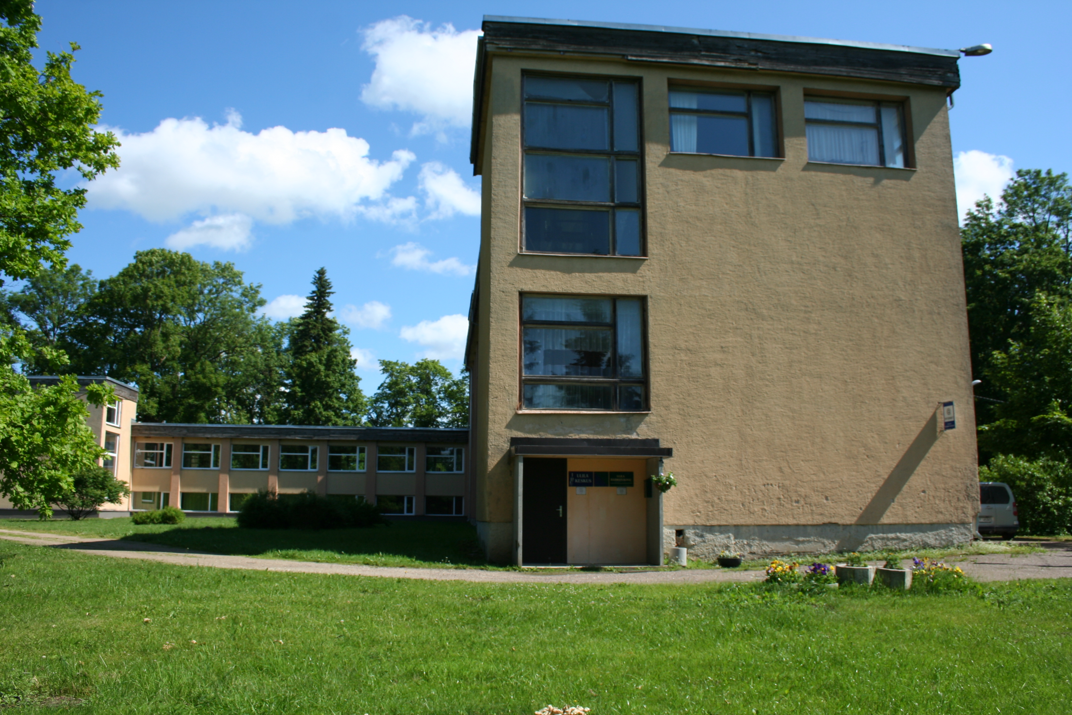 Ulila raamatukogu